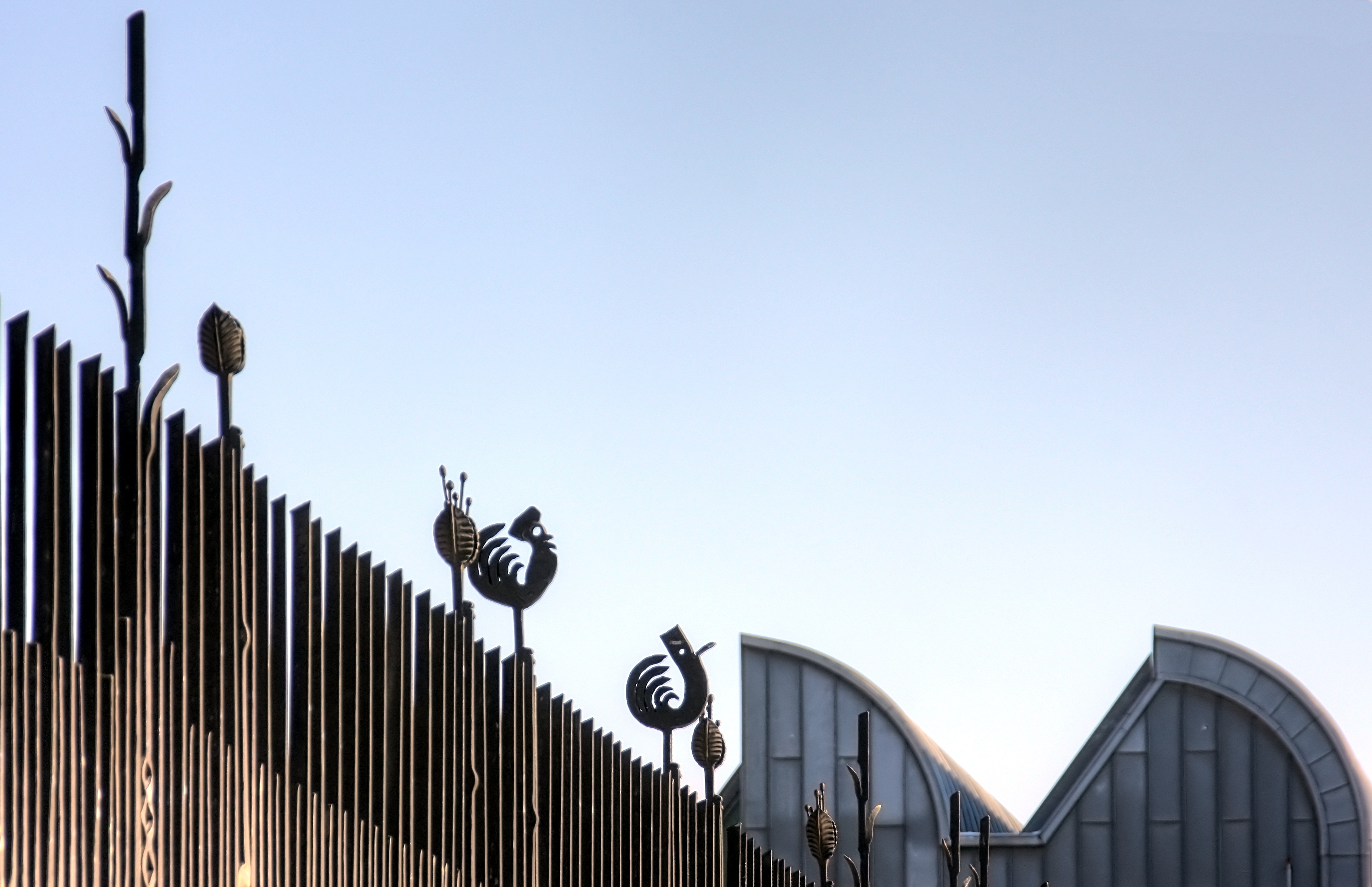 Kölner Dom, Gitter vor dem Südportal von Paul Nagel. Detail